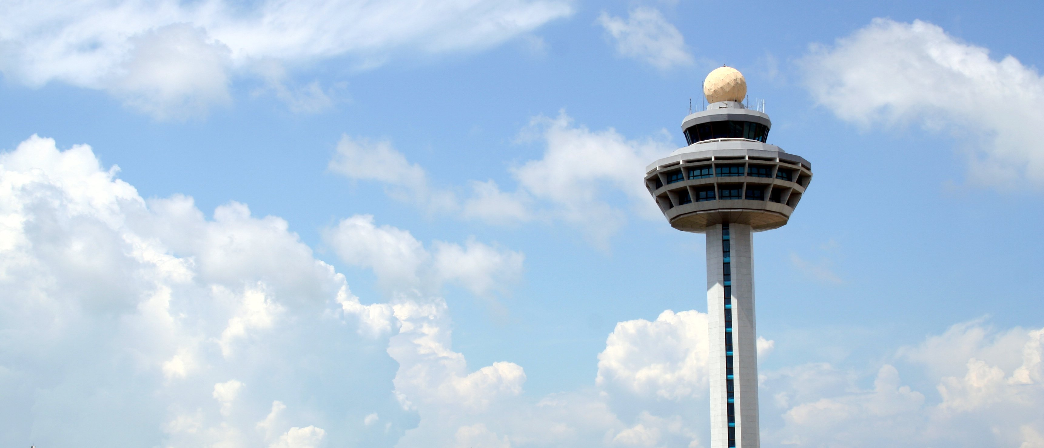 see it large